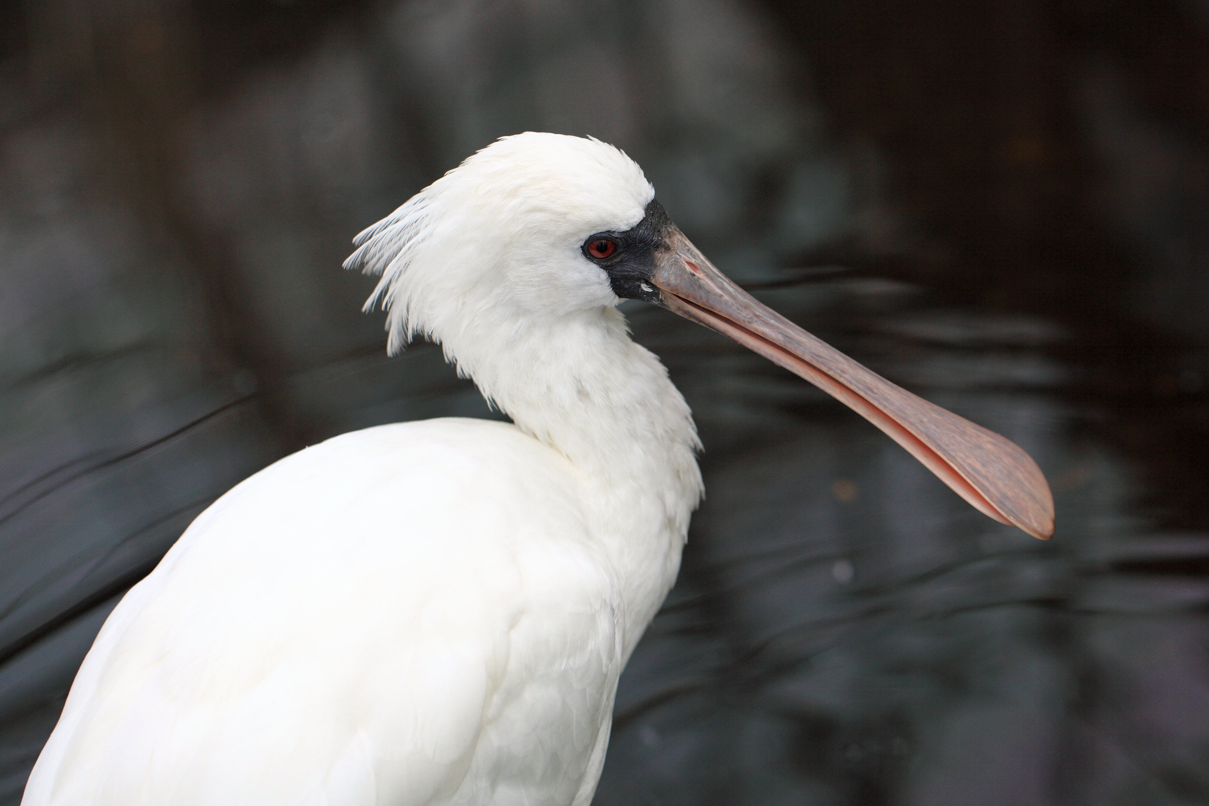 Kakegawa Kacho-en , Kakegawa-shi(city) Shizuoka-ken(Prefecture), Japan 静岡県掛川市(しずおかけん かけがわし) 掛川花鳥園(かけがわかちょうえん)